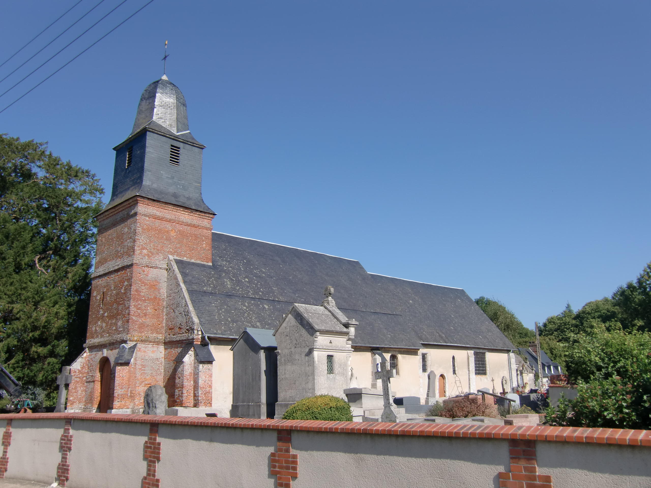 église de Boulleville (Eure, Normandie, France)